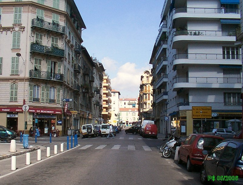 Nice - Quartiers de Nice Nice - Quartier de Riquier Vue générale de la rue Beaumont (sens unique d'Est en Ouest). Noter le plan d'urbanisation en damier.